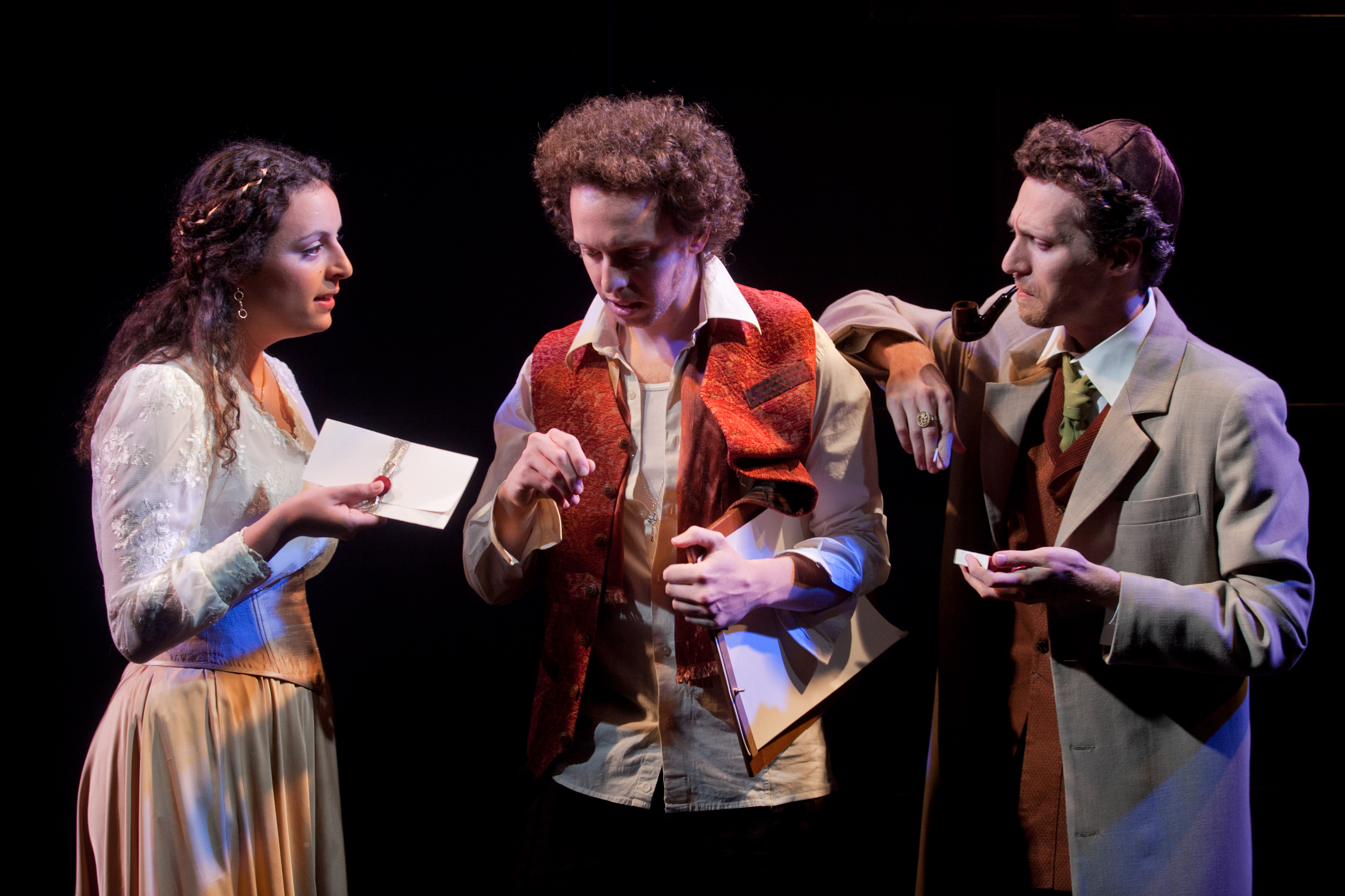 ויטלי פרידלנד, איתי זבולון ואורטל אבנעים, בהצגה "ירושלים החדשה" בבימויו של סיני פתר, תיאטרון החאן, 2012